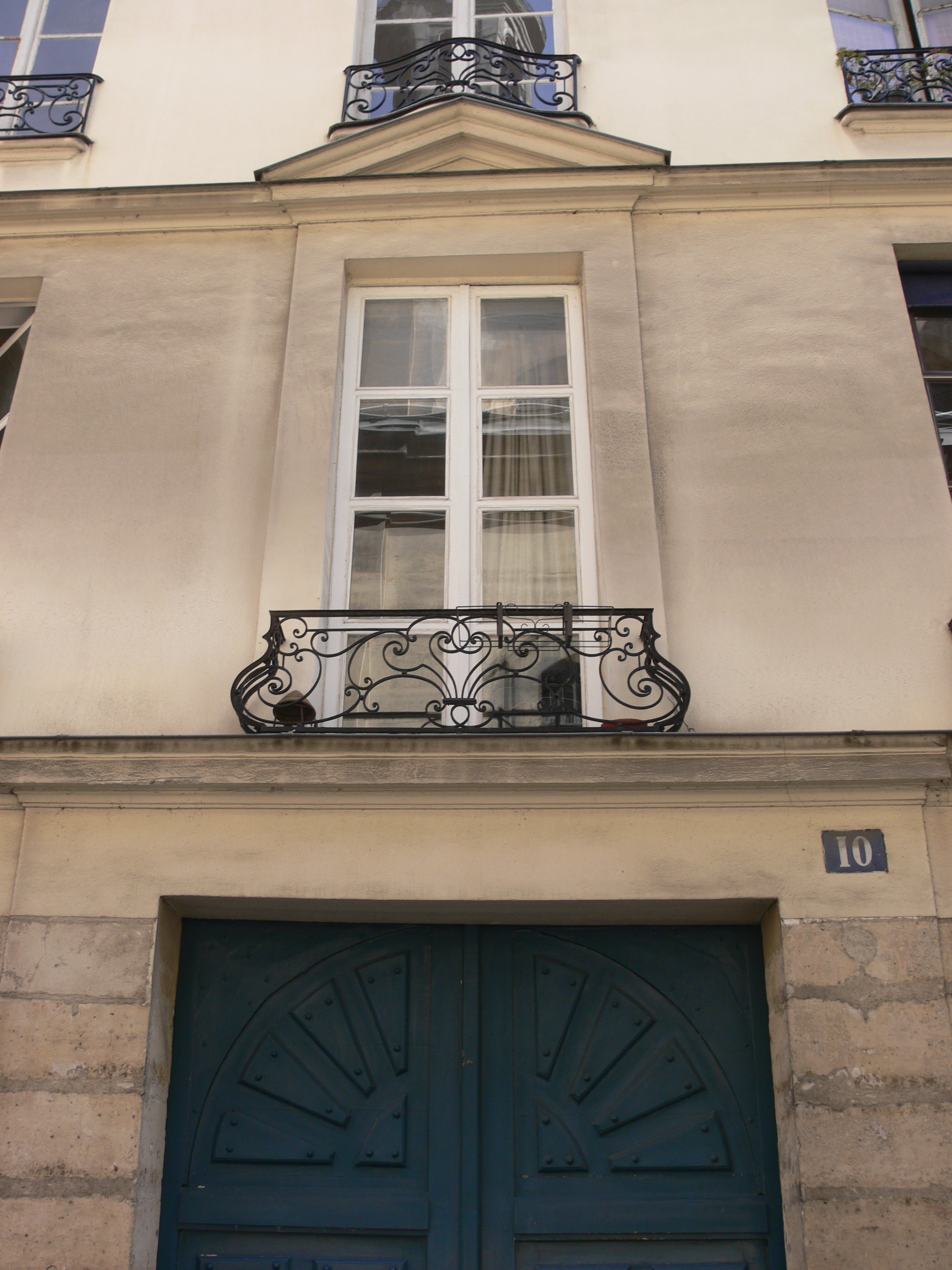 Paris - 10 rue Notre-Dame-des-Victoires .